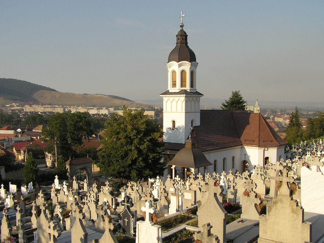 Stadtansicht von Codlea (Zeiden), Rumänien. Orthodoxe Kirche im VordergrundRomână: Biserica cu cimitirul ortodox din Codlea (Zeiden), România